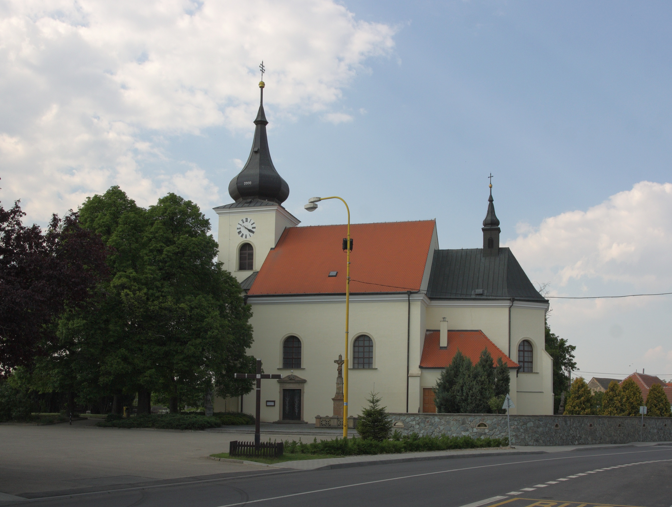 Velké Němčice - kostel svatých Václava a Víta.